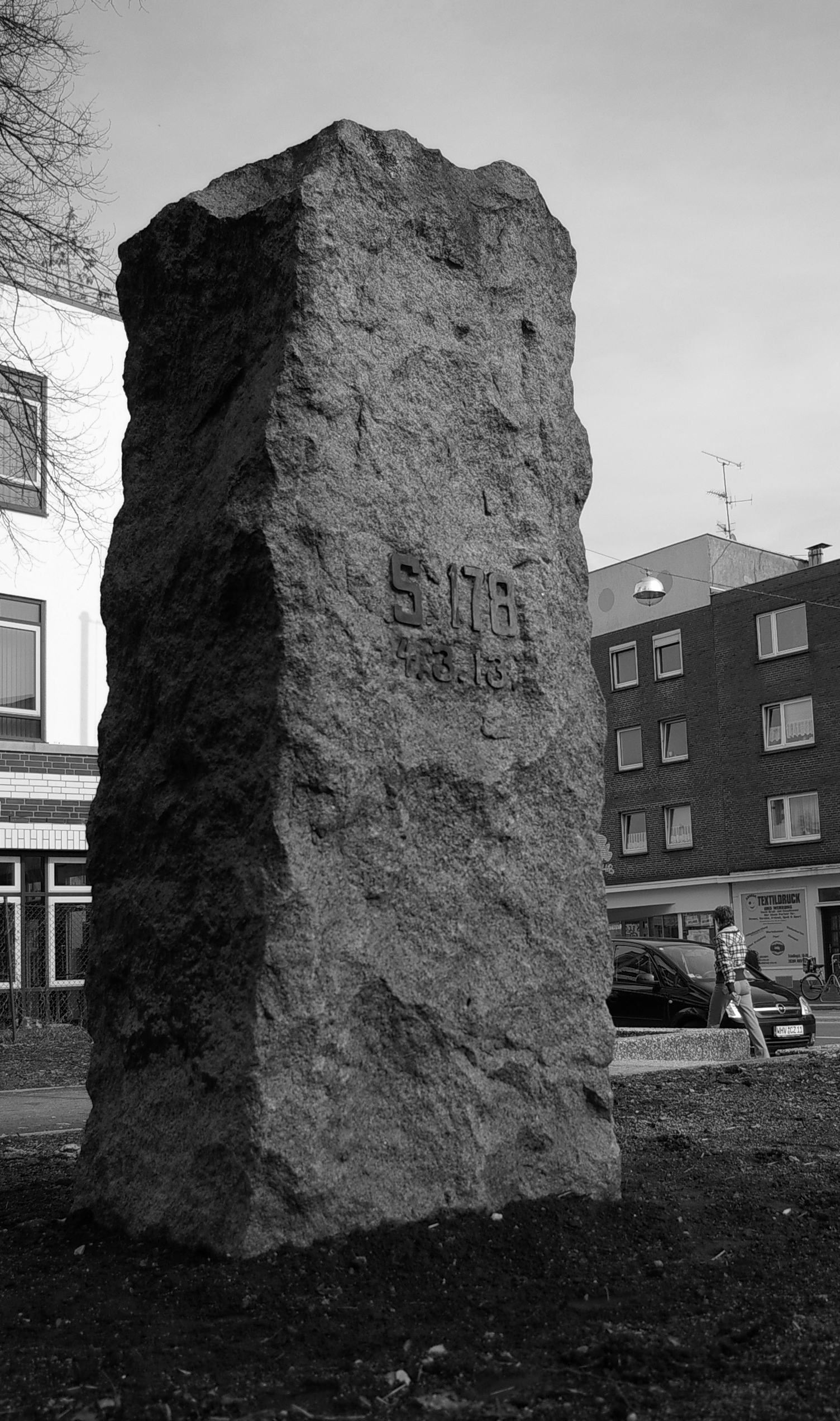 S.M. Torpedoboot S 178 Gedenkstein für das Torpedoboot S 178 in Wilhelmshaven, Gökerstraße. Das Boot wurde am 4. März 1913 von S.M.S. Yorck gerammt und dabei versenkt. 69 - 71 Tote. Nicht zu verwechseln mit sowjetischen Atom-U-Boot S 178, das ebenfalls sank.